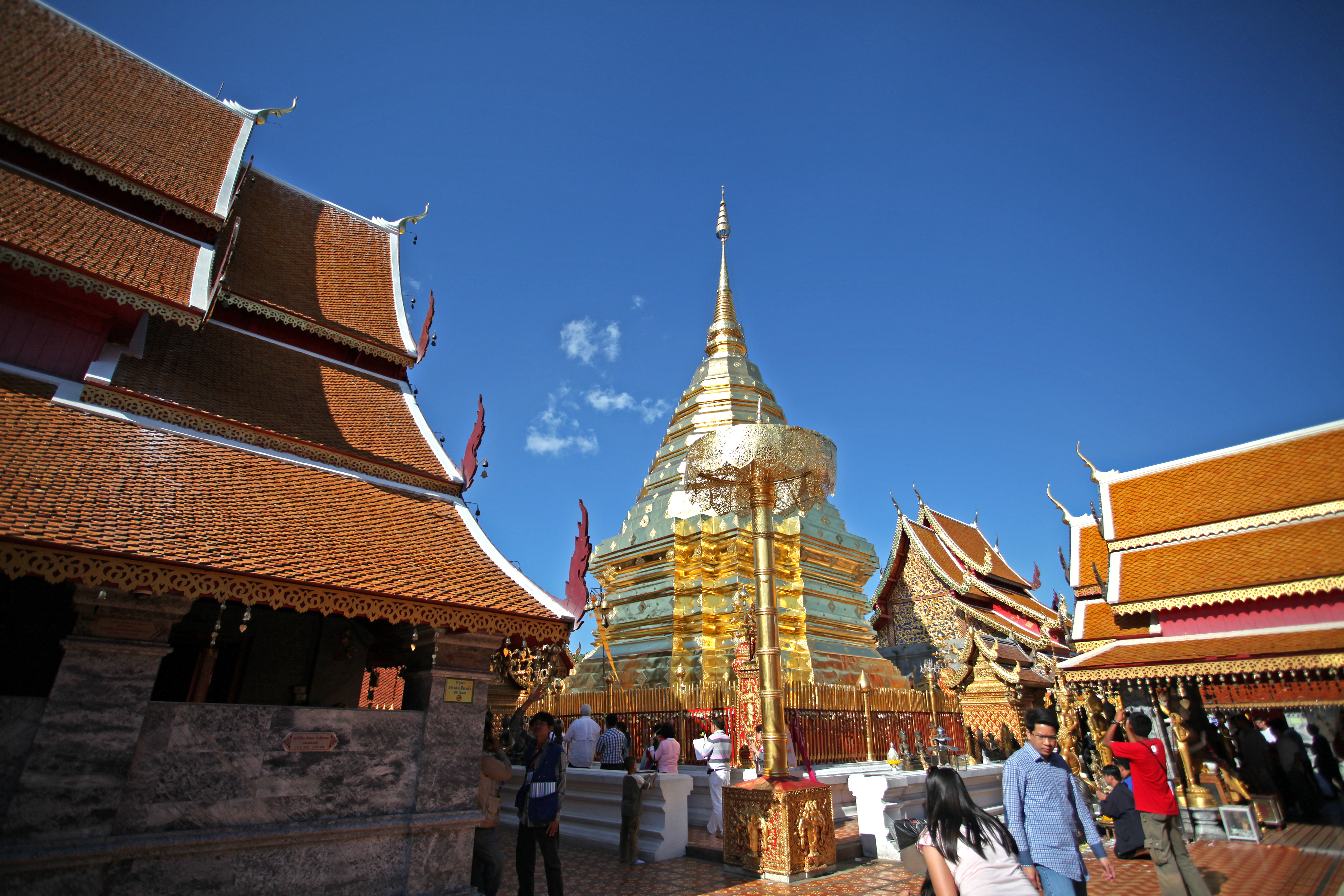 พระธาตุดอยสุเทพ